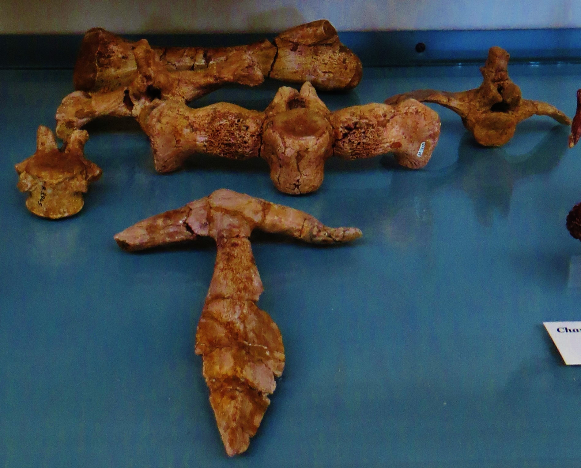 Fossil of Simoedosaurus, an extinct reptile- Took the photo at Musee d'Histoire Naturelle, Paris